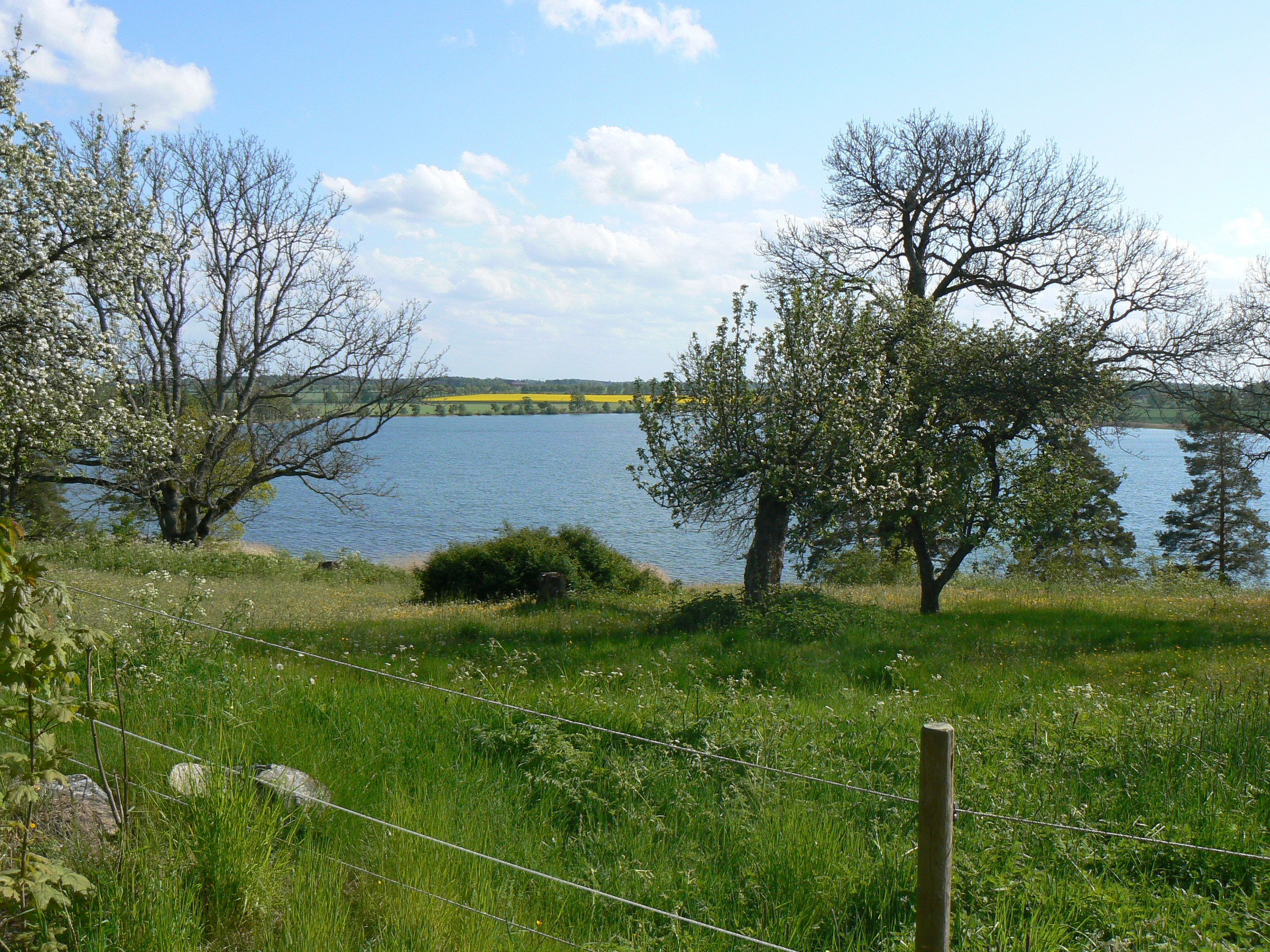 Lake Ljungsjön in Linköping municipality, Östergötland, Sweden.